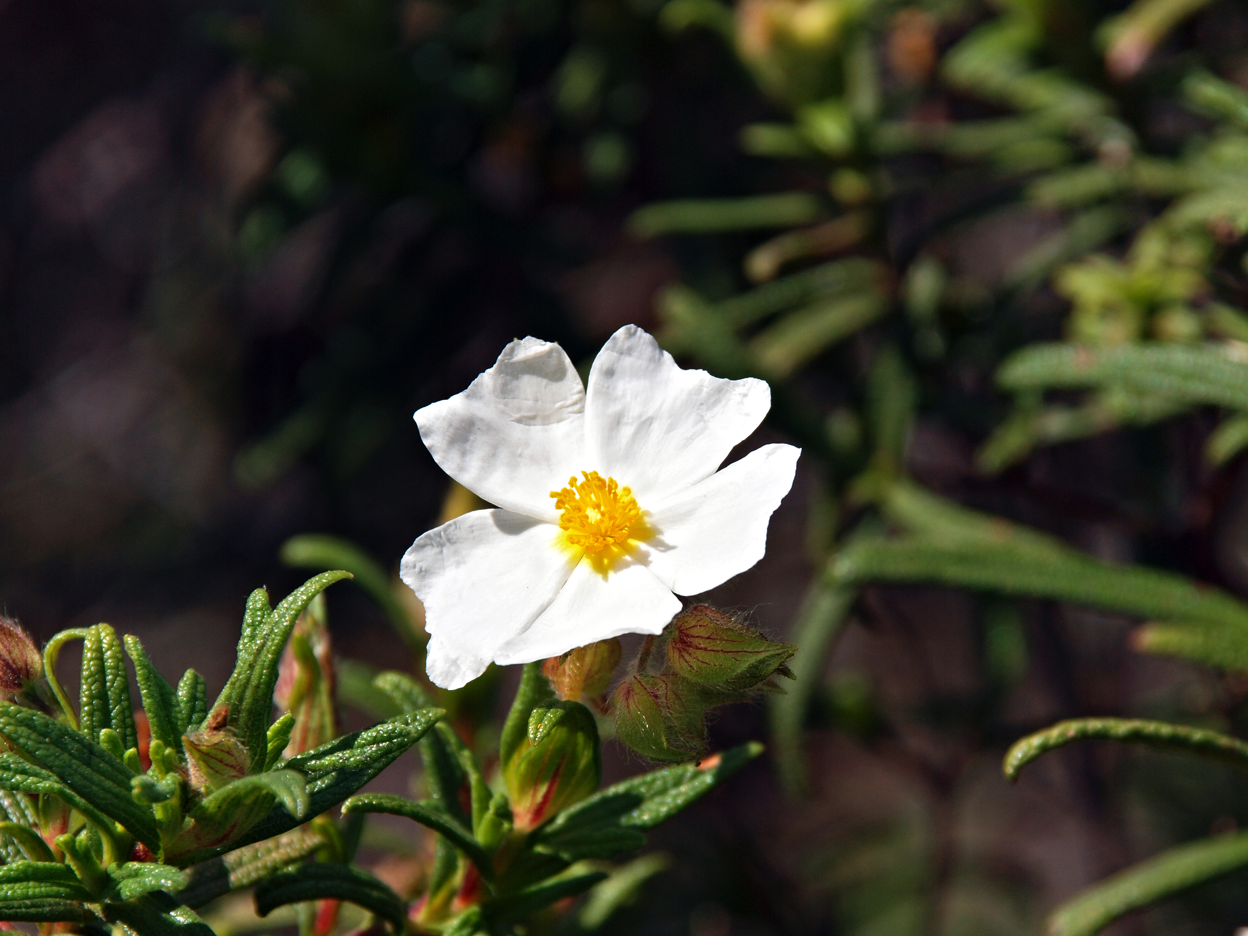 Santo-Pietro-di-Tenda, Nebbio (Corse) - Ciste de Montpellier dans le Désert des Agriate